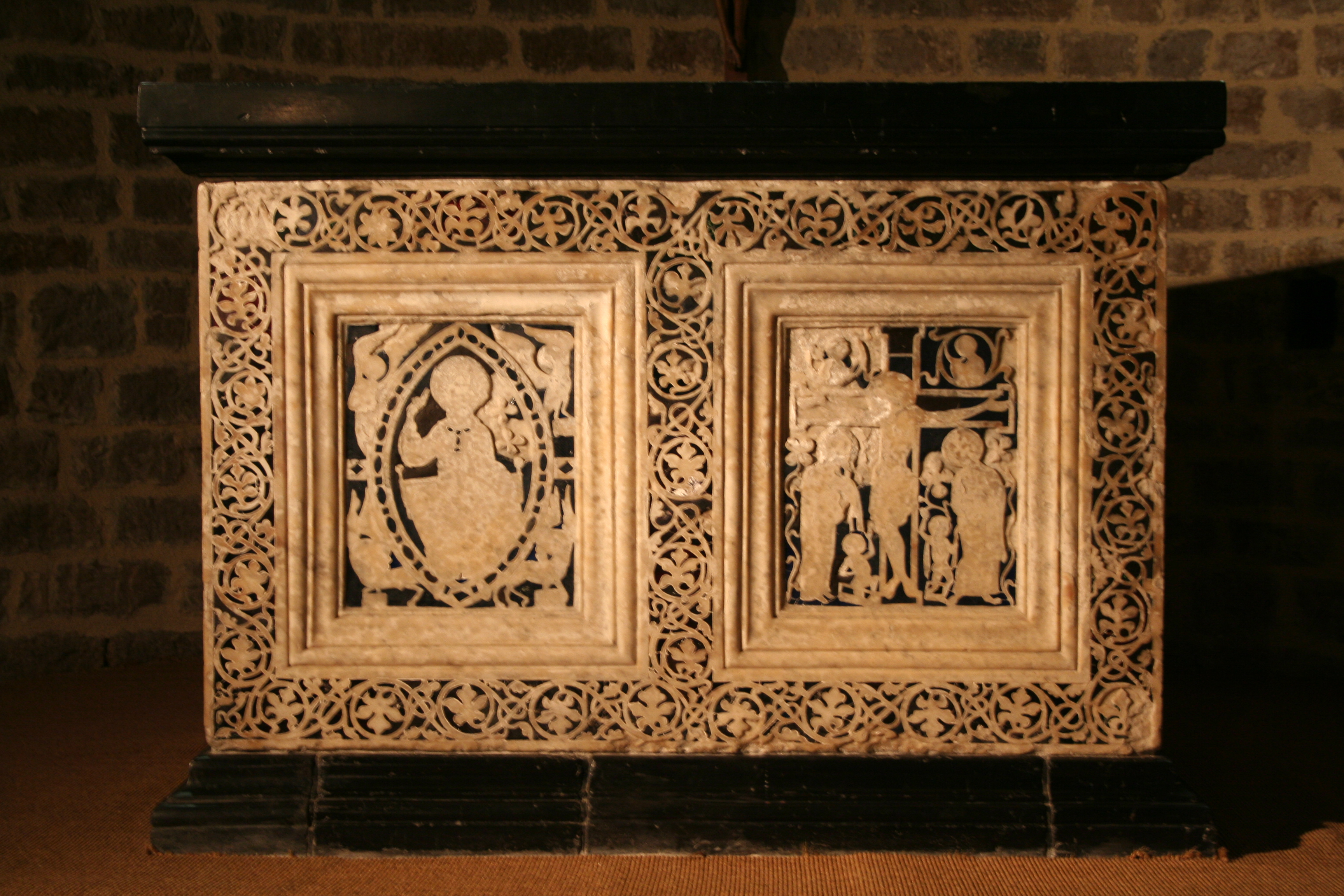 Saint-Guilhem-le-Désert (Hérault) - autel de Guilhem (XIe s).